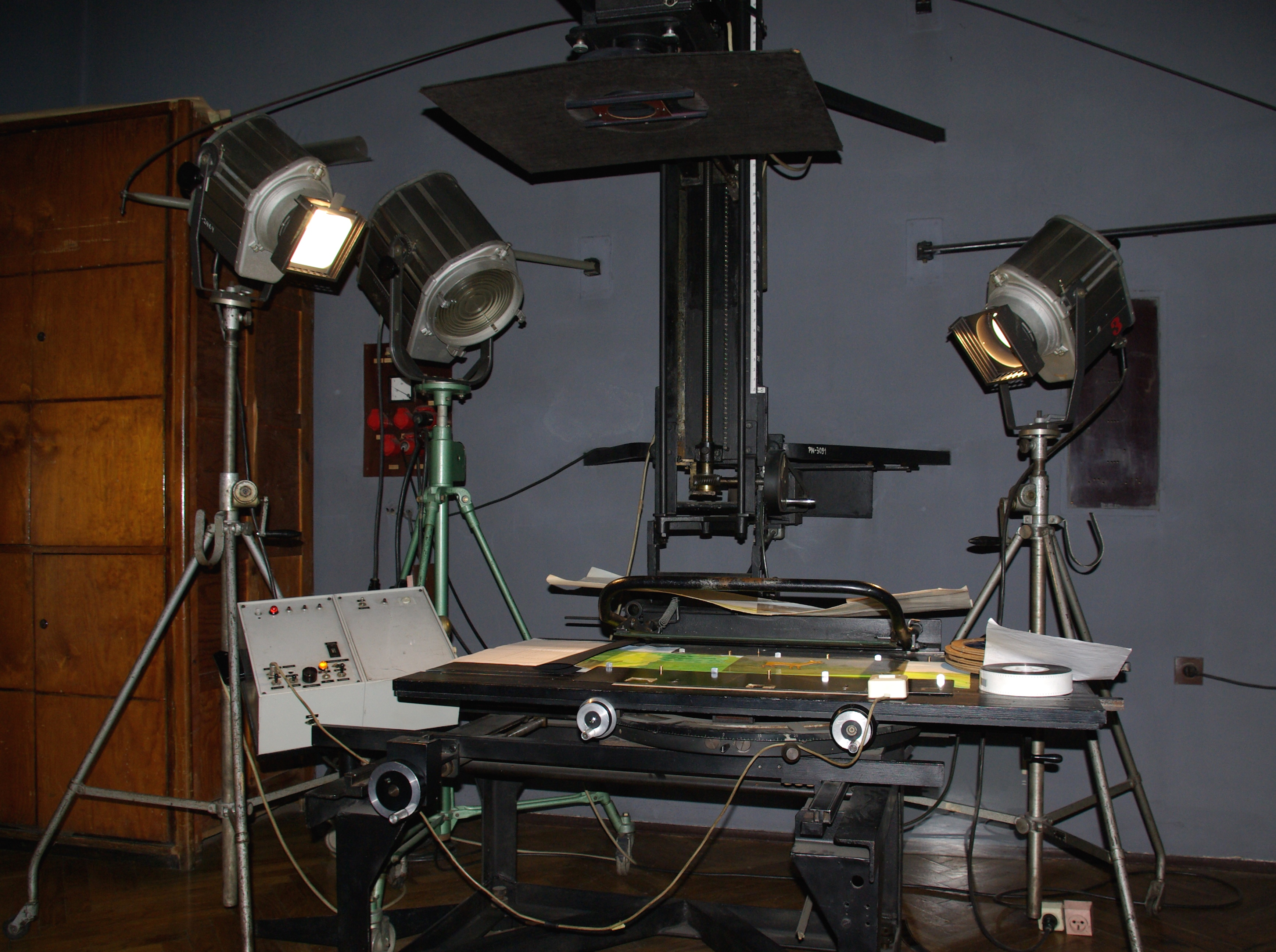 Studio Filmów Rysunkowych w Bielsku-Białej